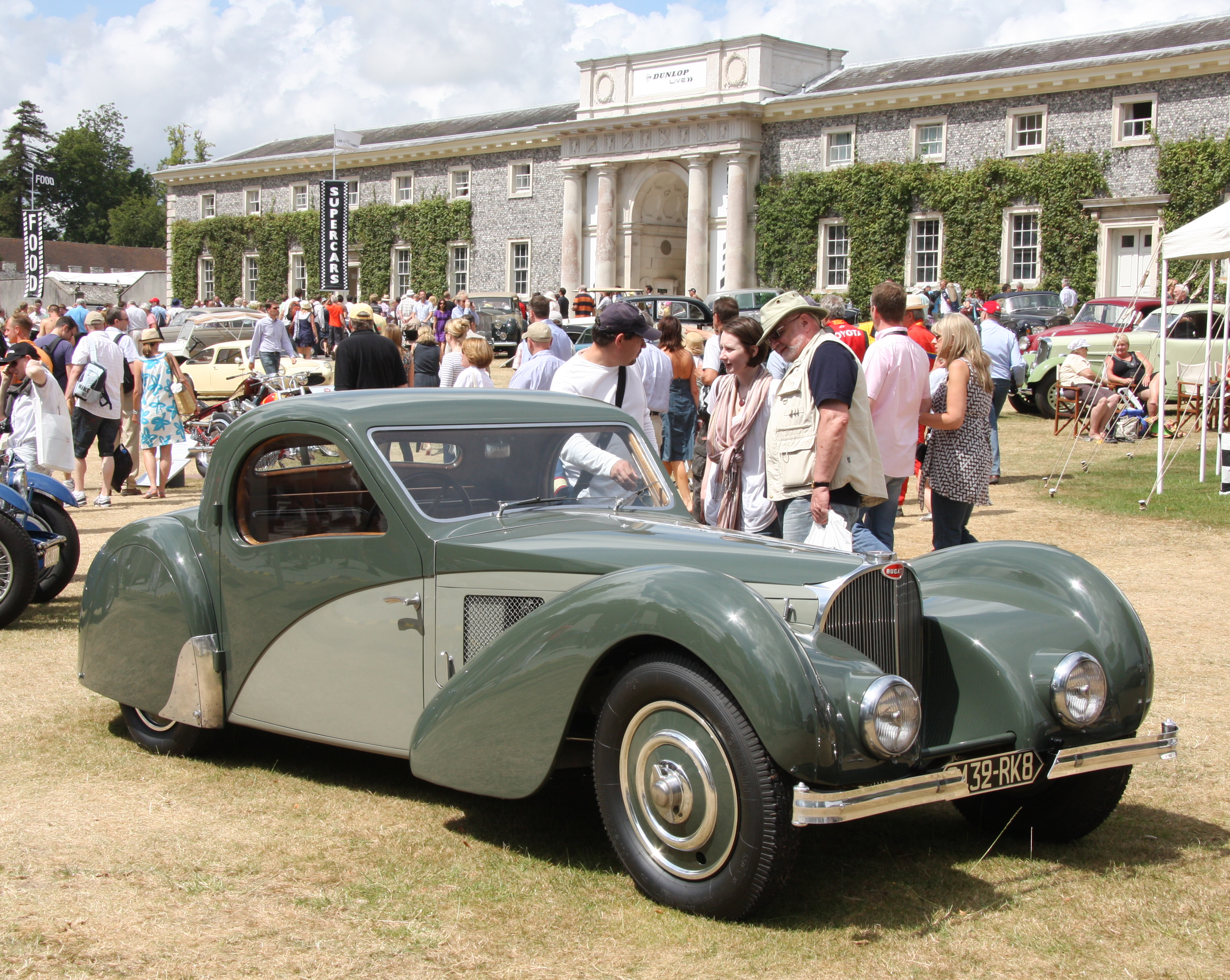 Goodwood 2009